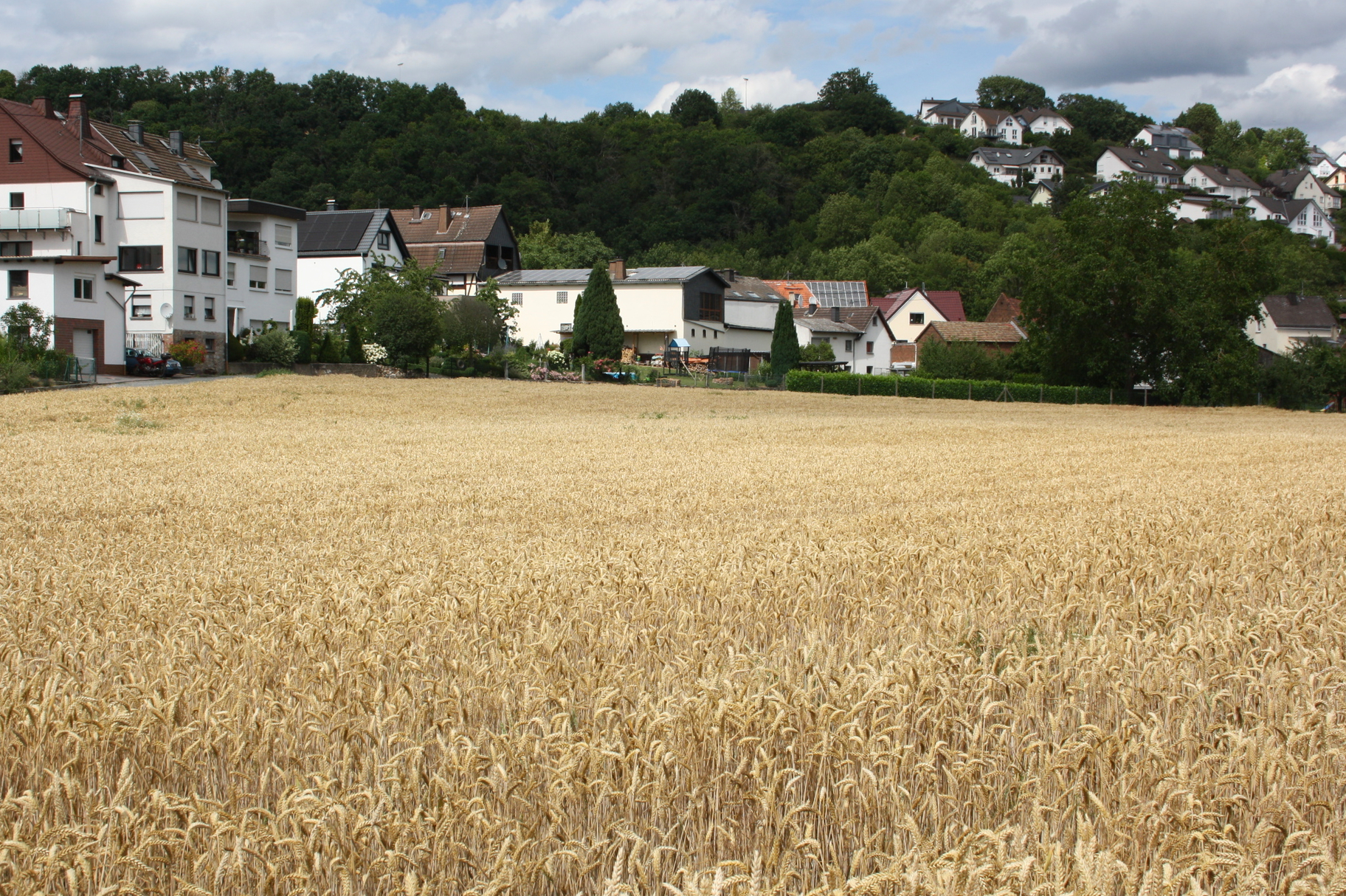 Aull, Gemeinde im Rhein-Lahn-Kreis, Rheinland-Pfalz, Deutschland